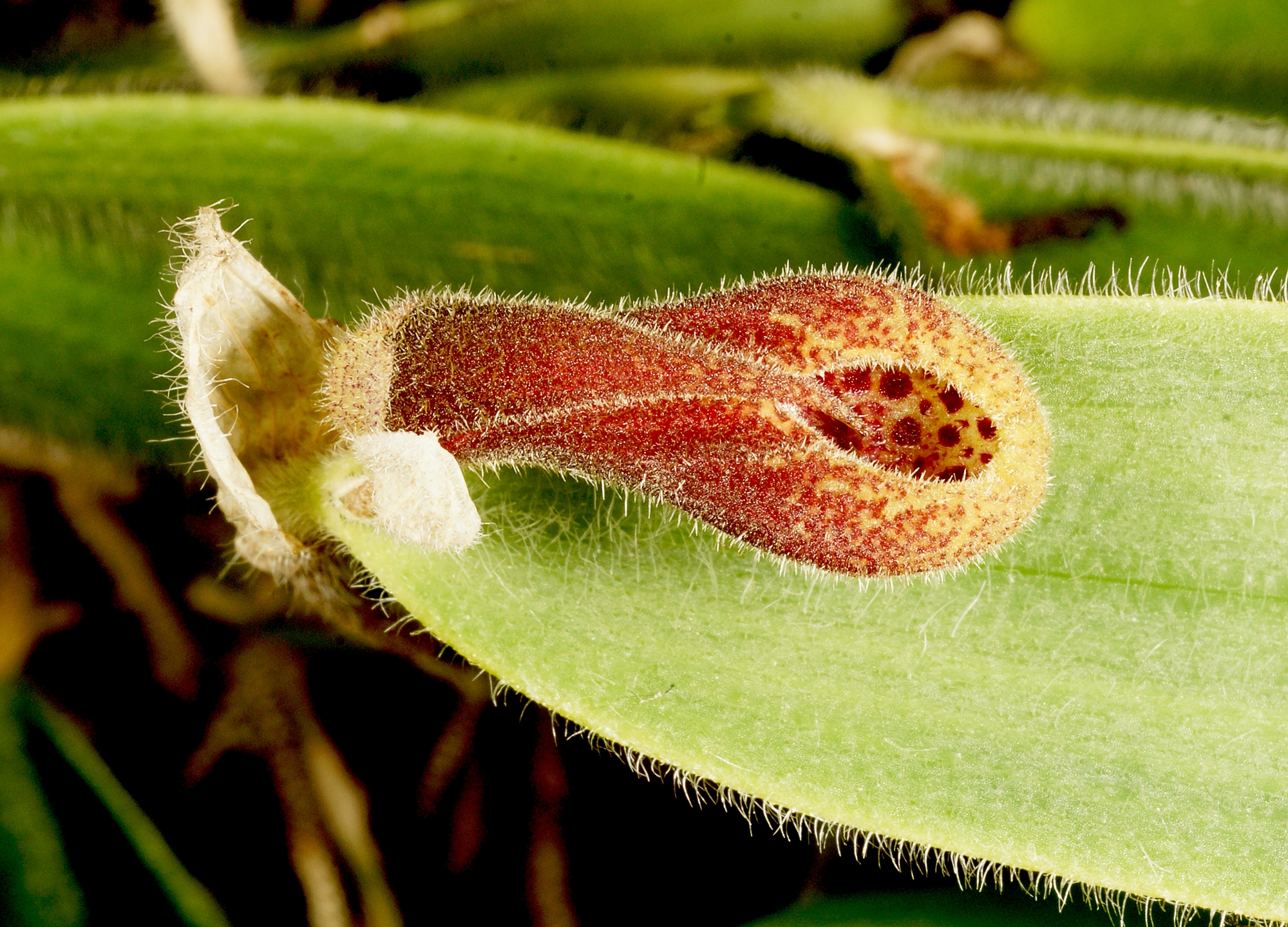 Dresslerella caesariata